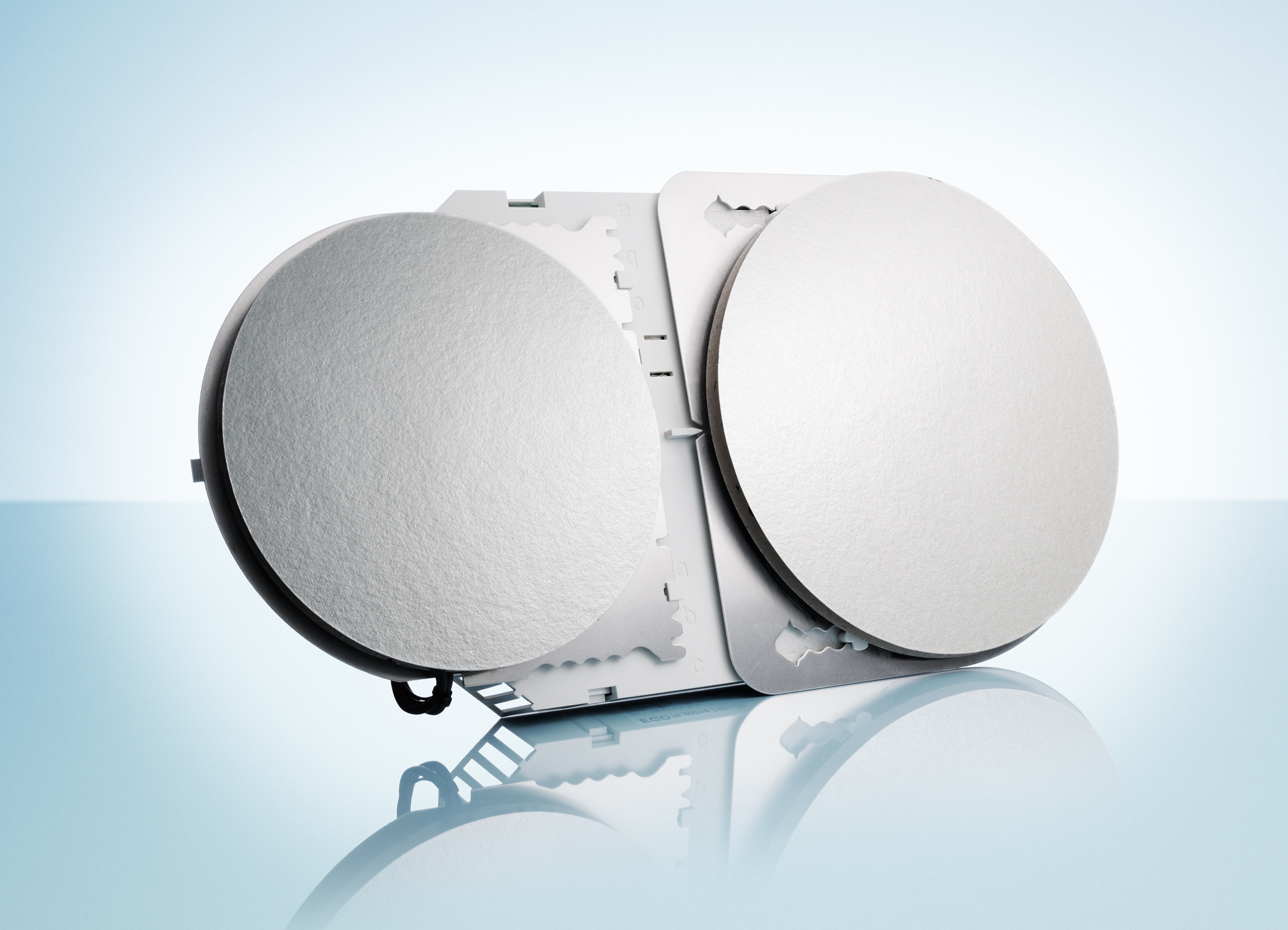 Induktionskochplatten